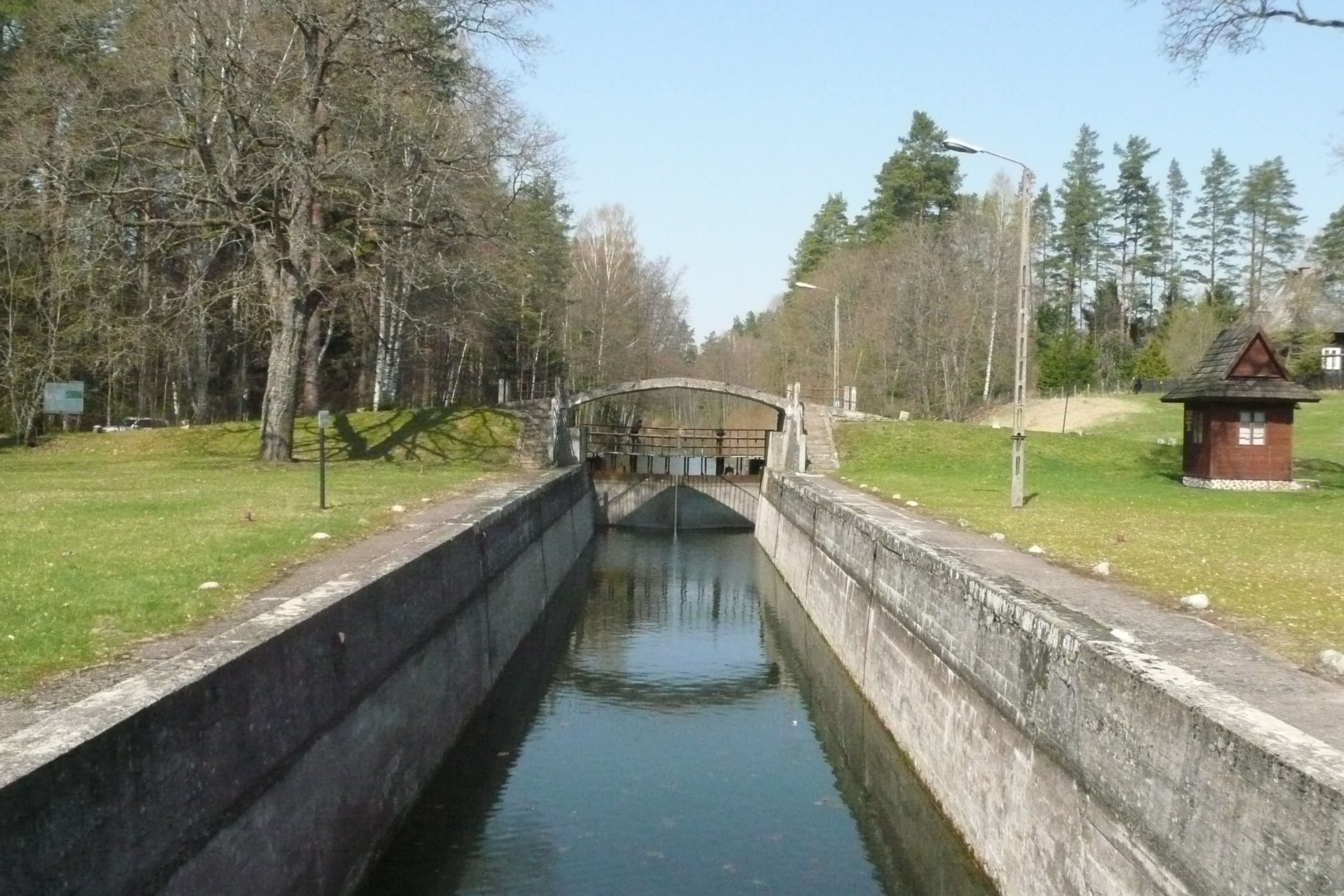 Widok na śluzę od strony górnych wrót